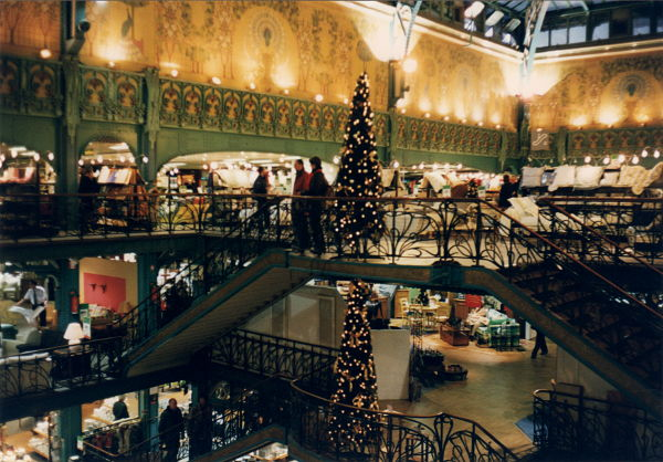 Intérieur du magasin 2 de la Samaritaine, Paris